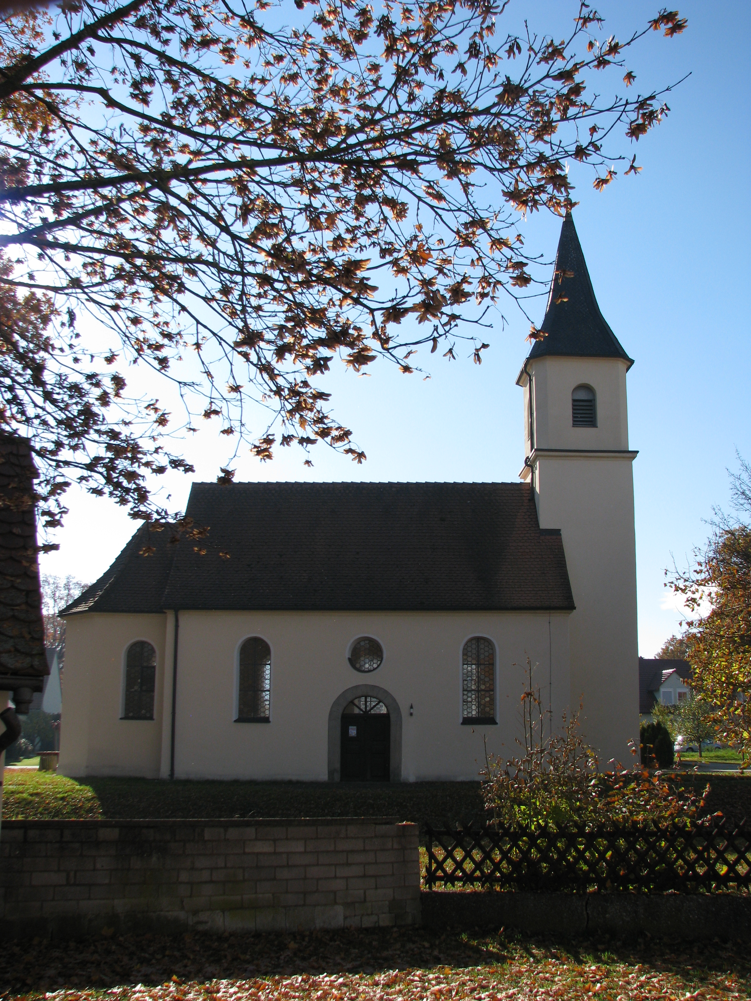 Karm, Ortsteil von Hilpoltstein im mittelfränkischen Landkreis Roth (Bayern), Katholische Dorfkirche St. Marien